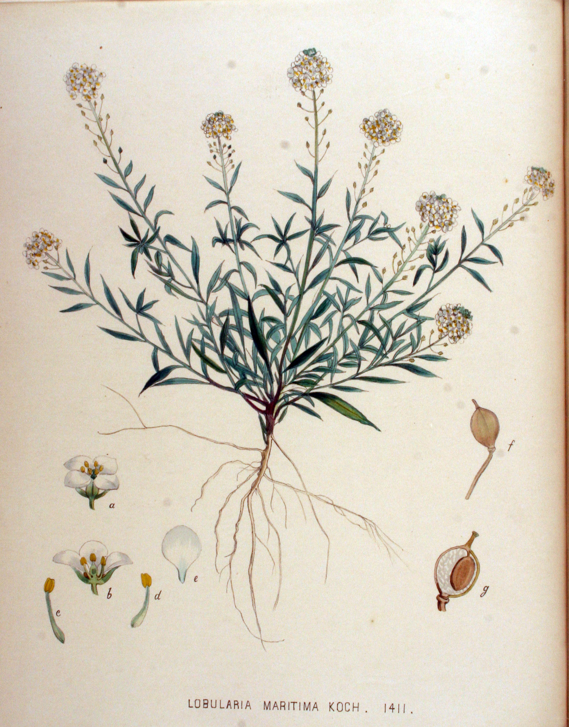 Lobularia maritima (L.) Desv.